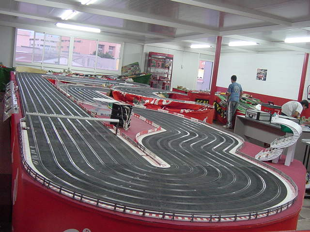 Un circuito Ninco per competizioni.